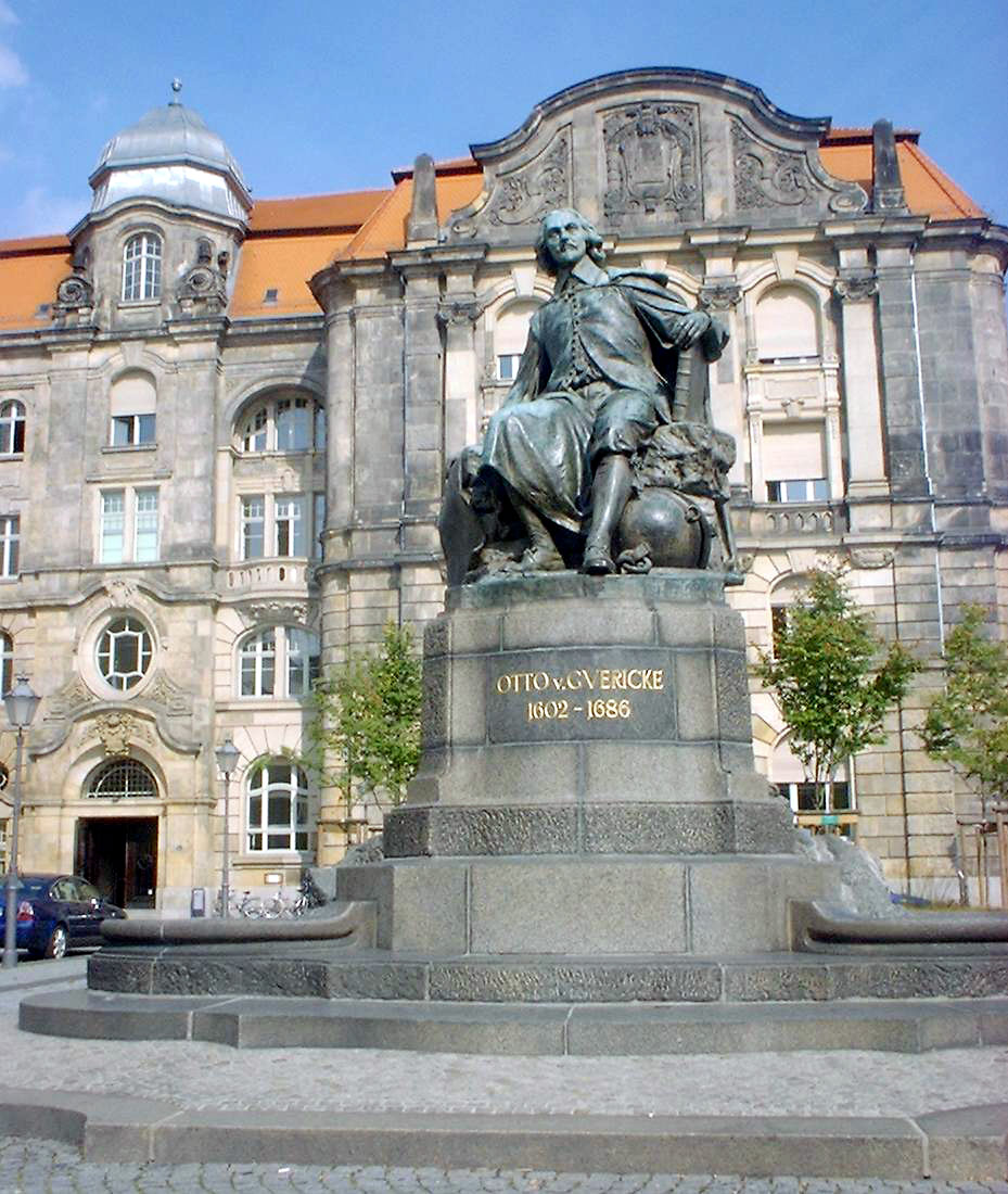 Otto-von-Guericke-Denkmal in Magdeburg.